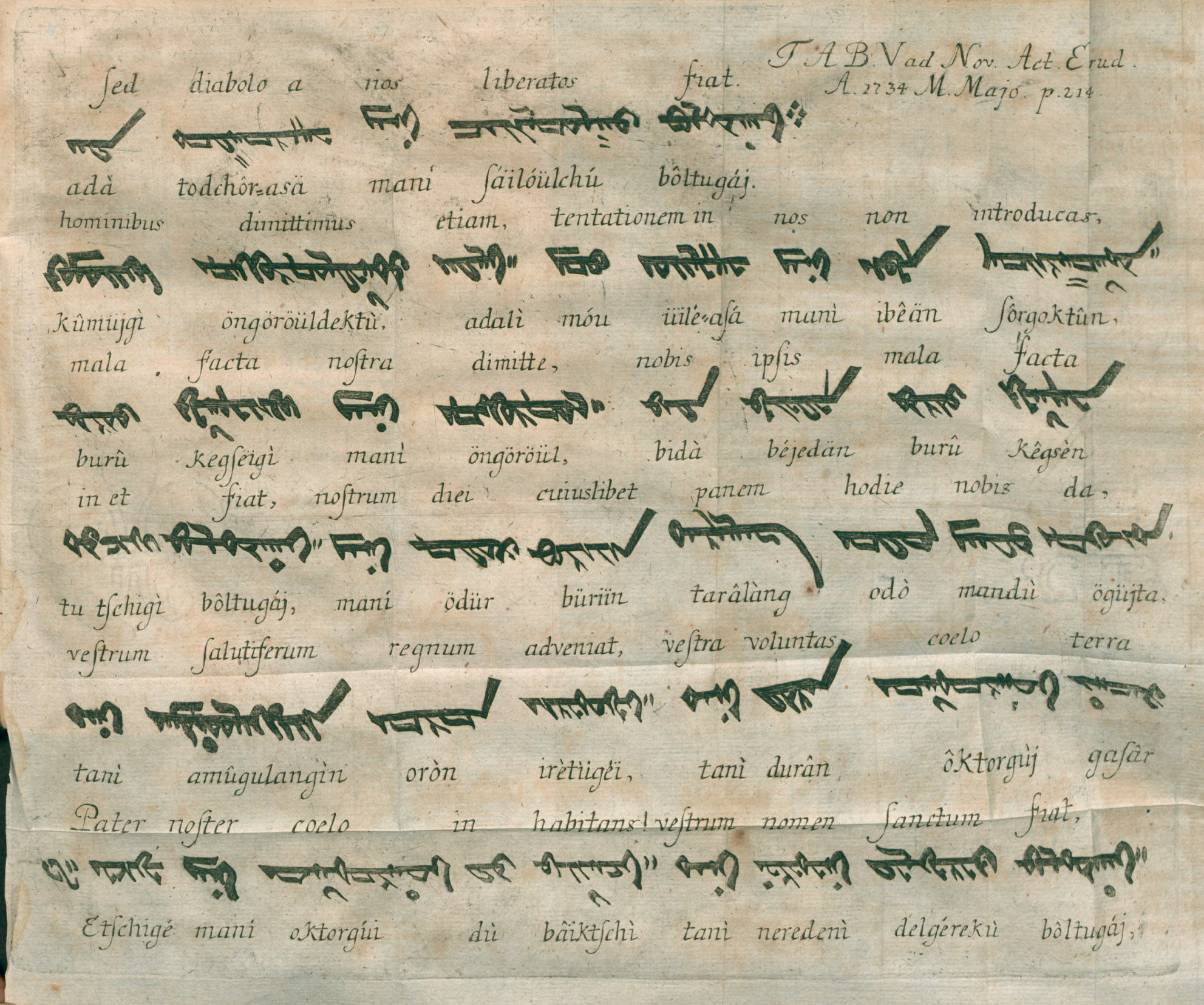 Illustration